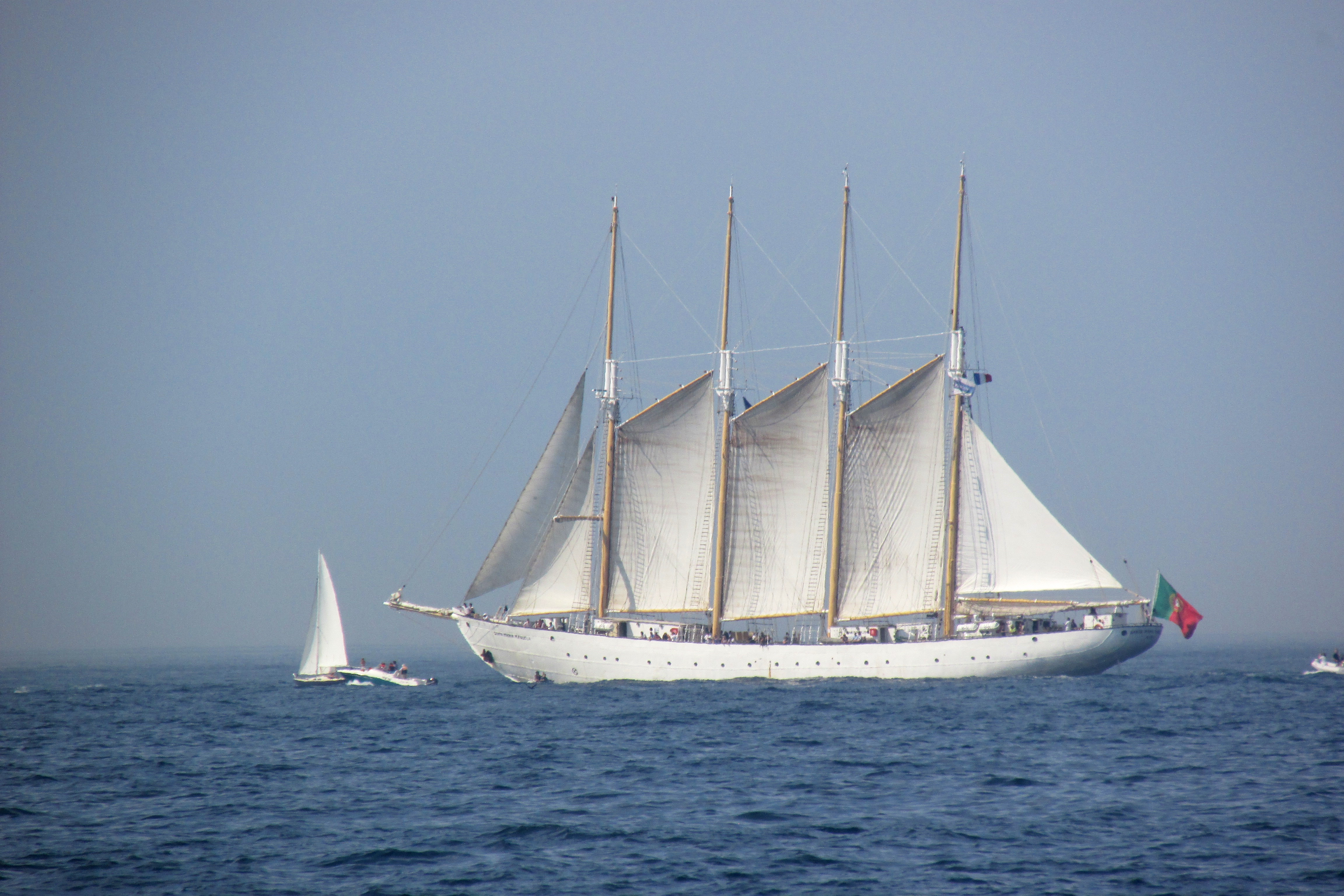 Santa-Maria-Manuela sous voiles